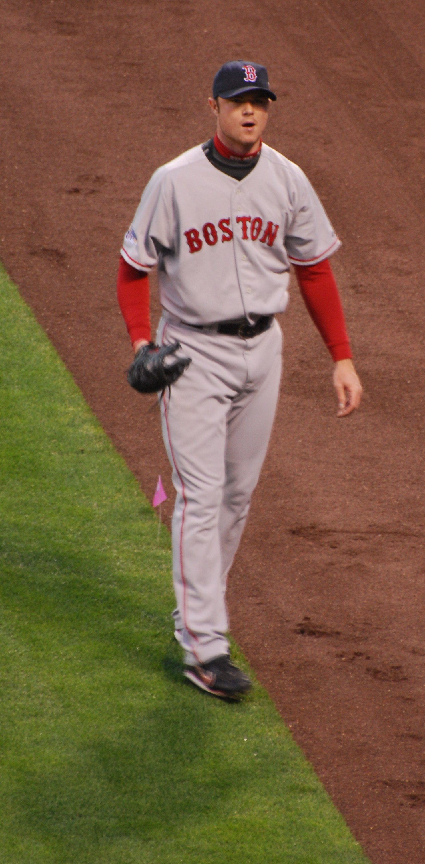 Jon Lester